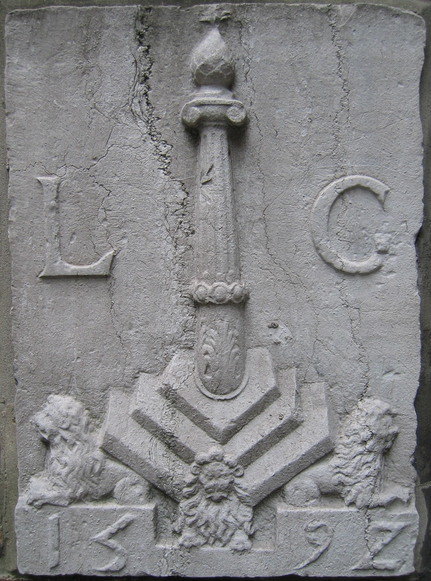 Le blason gravé dans une pierre bleue, daté de 1592.